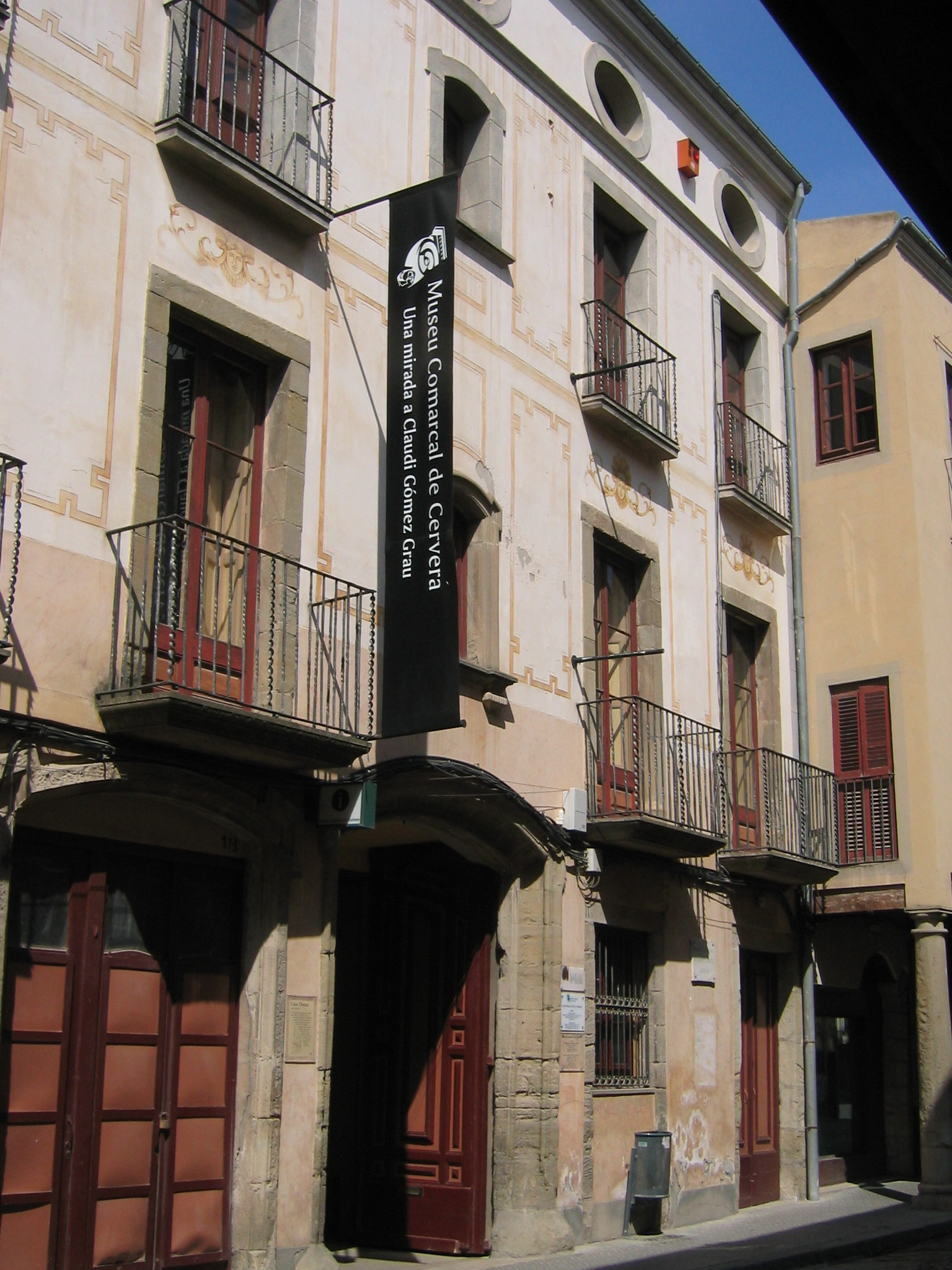 Vista general de la Casa Museu Duran i Sanpere de Cervera